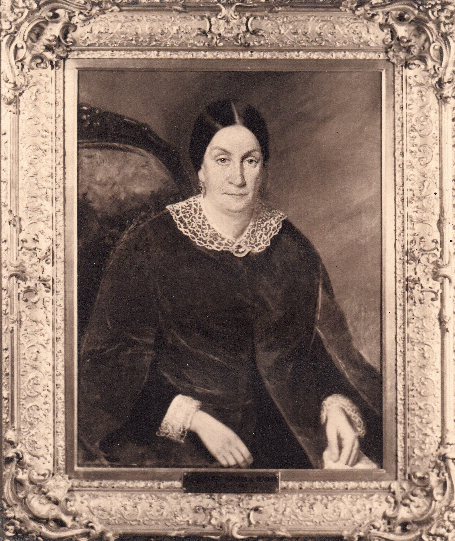 Mercedes Lois Vergara , esposa de Pedro Nolasco Vergara Albano. Retrato de Raymond Monvoisin del año 1859 en Santiago de Chile.